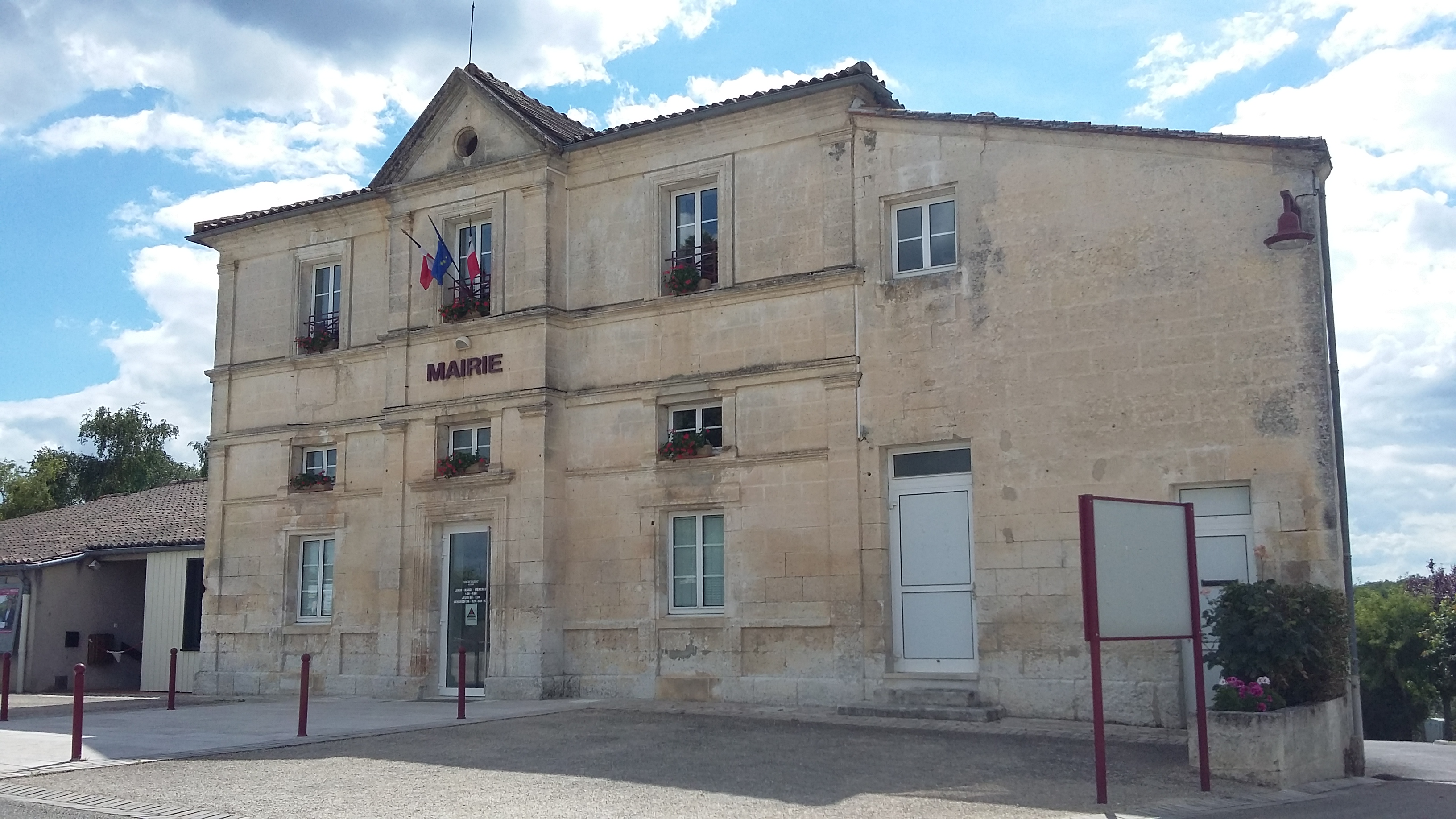 Mairie de la commune de Dirac en Charente